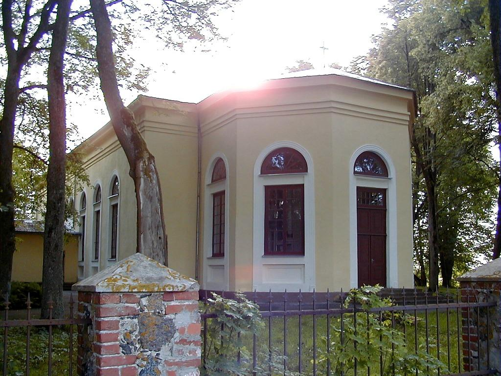 Nīcas baznīca 2000-07-08